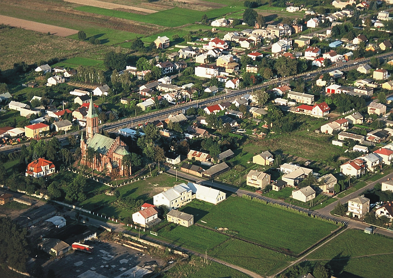 Zdjęcie lotnicze centrum miejscowości Dębe Wielkie